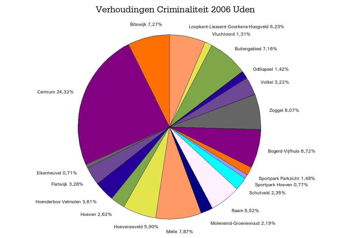 Aandeel Criminaliteitcijfers Uden per wijk(2006), Noord-Brabant, The Netherlands